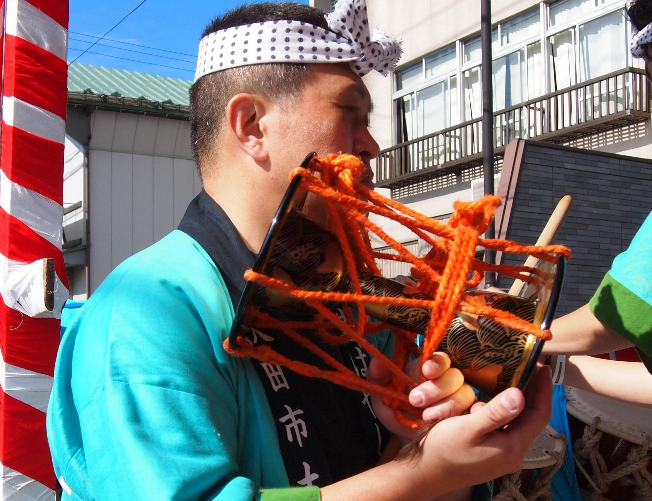 Tsuchizaki-Shinmeisha-Shrine Annual Celebration And The Float Festival (Akita City, Japan)